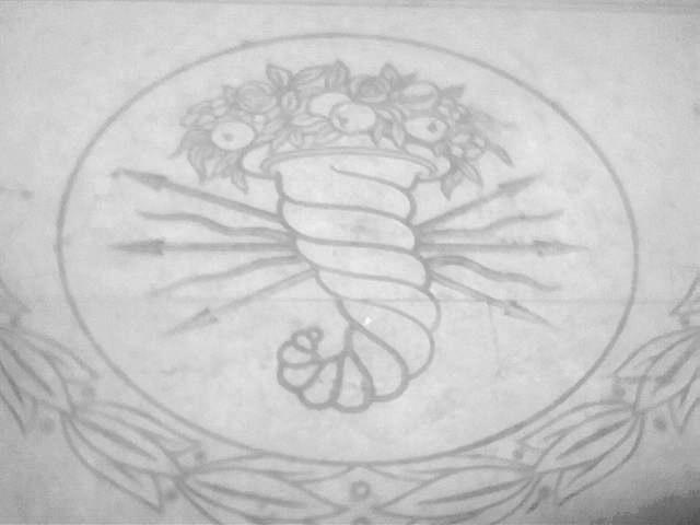 Imagen de una cornucopia, elemento clásico de la simbología romana, con la que actualmente se suele identificar a la Valentia Edetanorum romana por aparecer en el reverso de algunas monedas romanas encontradas en la ciudad. Las naranjas, en este caso, son un añadido moderno, simbólico de la región. Fotografía de una baldosa o losa situada en el suelo de la Plaza de la Virgen, Valencia, España.